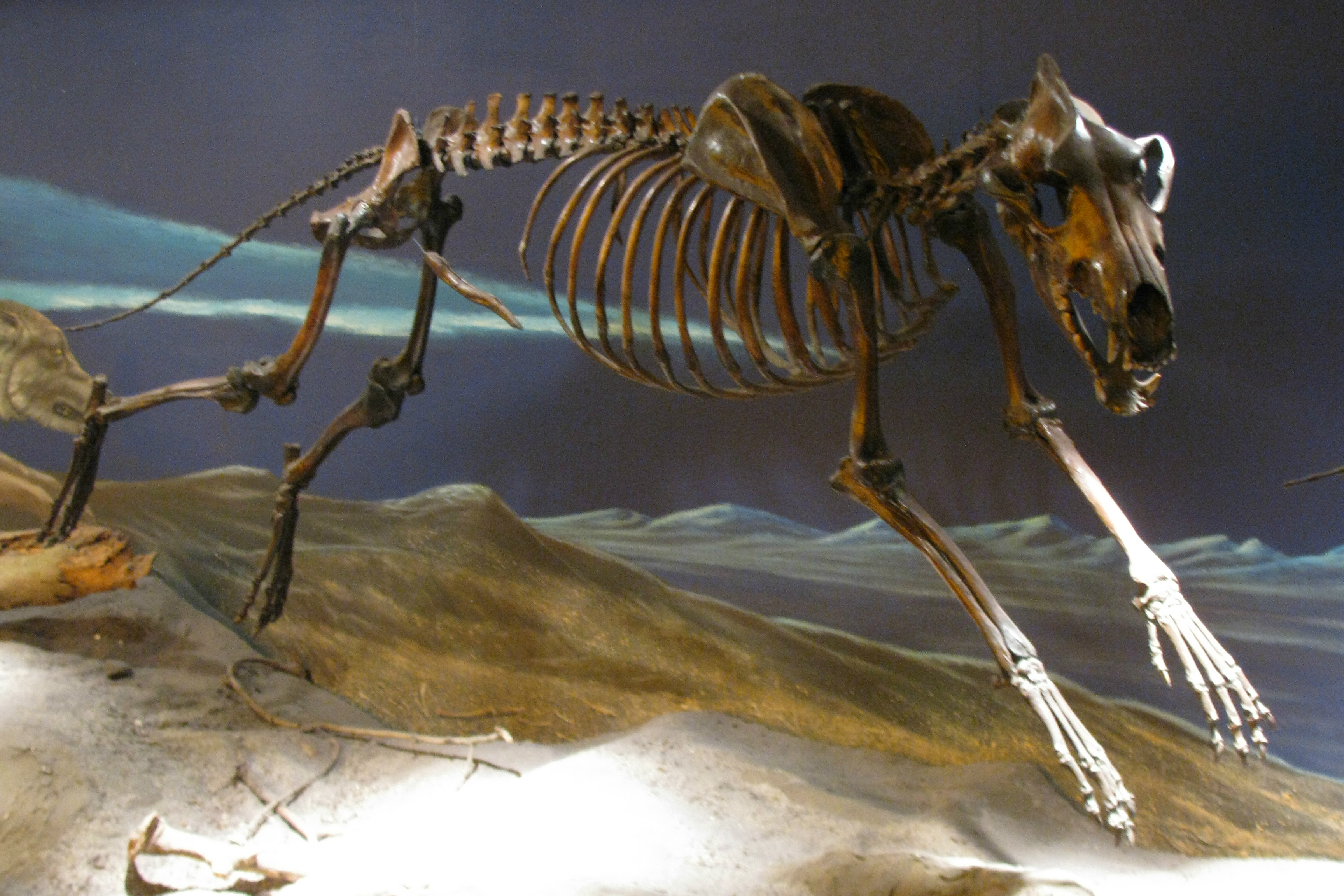 La Brea tarpits museum